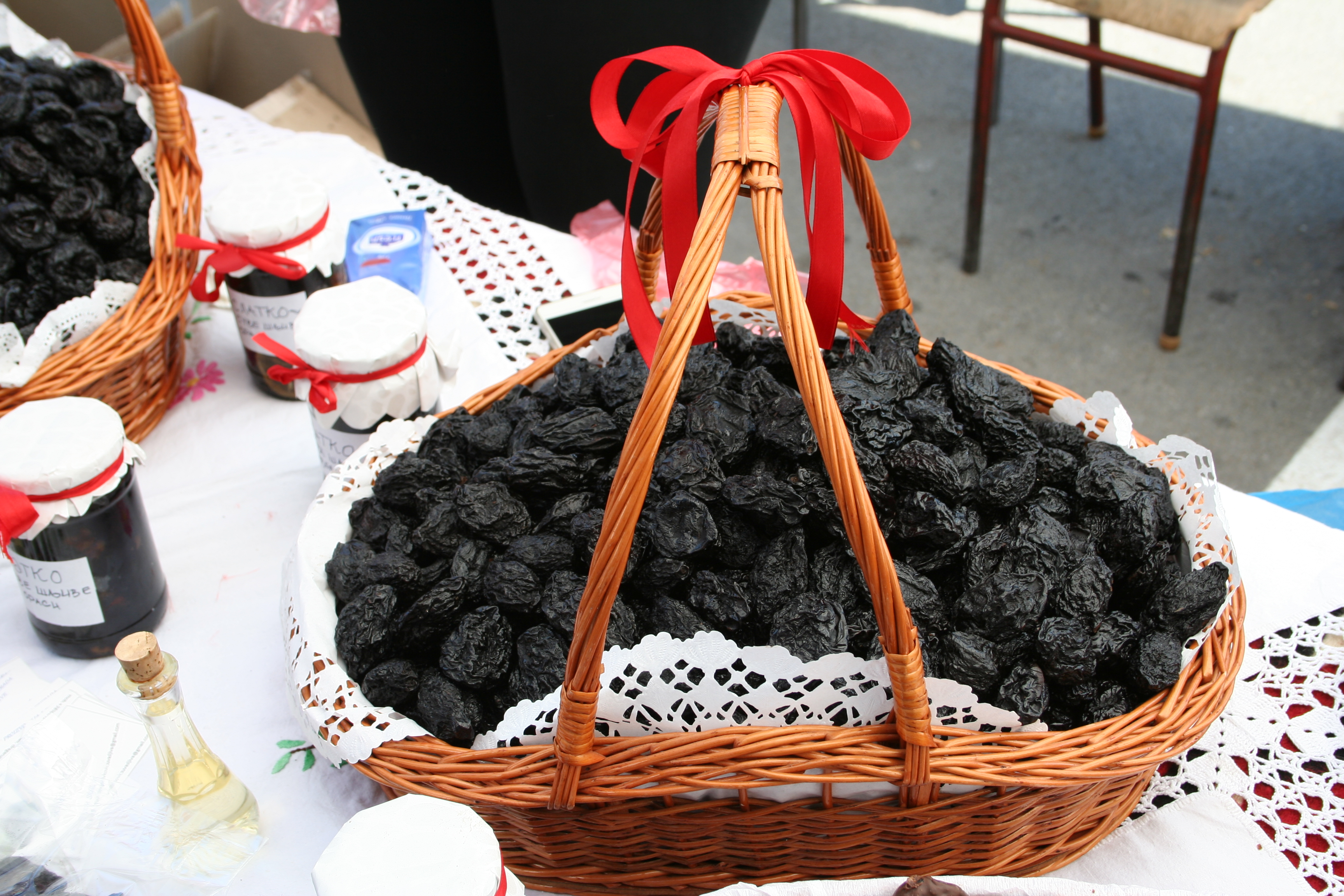 Festival zimnice 2016. Koceljeva